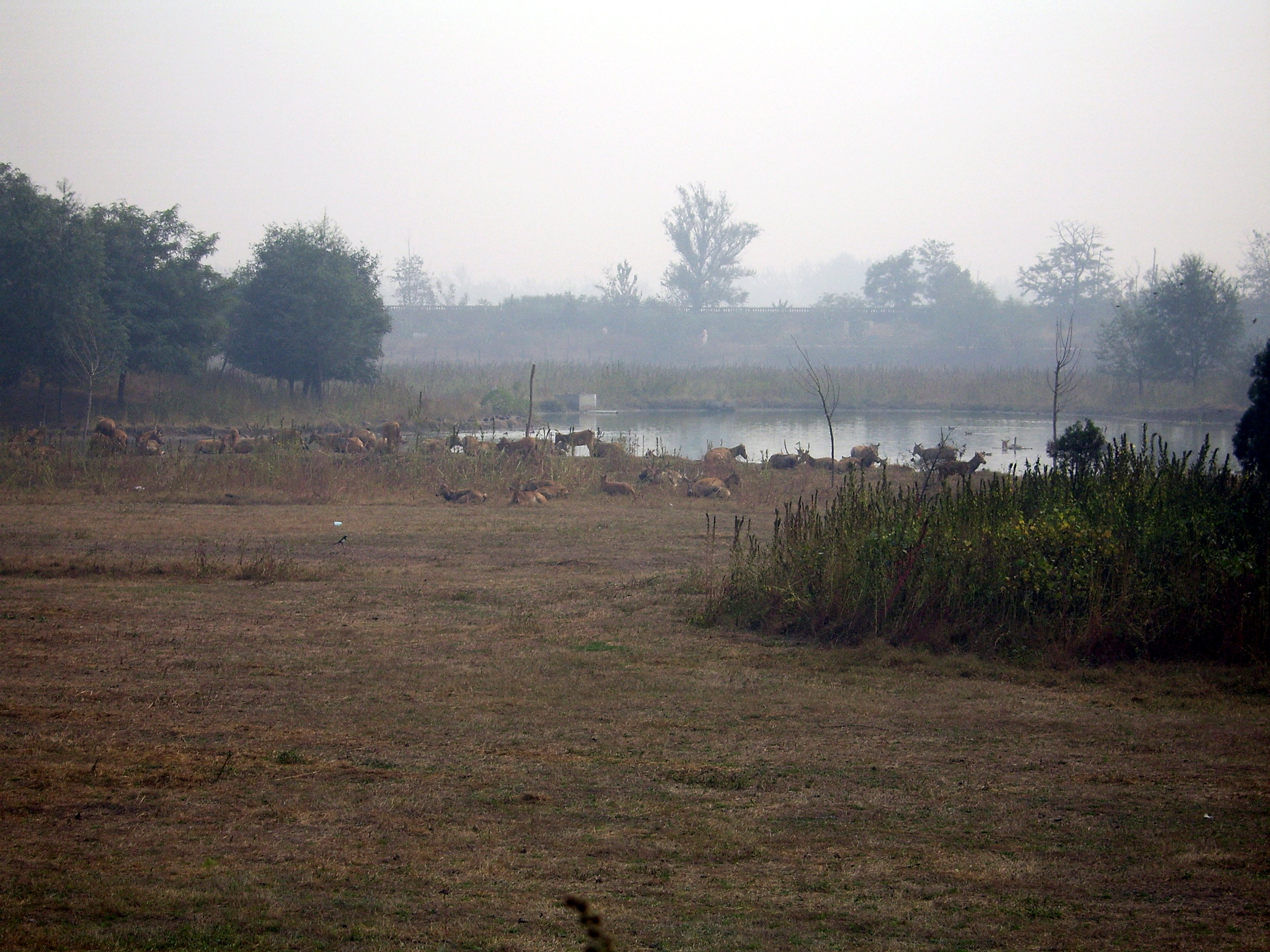 北京南海子麋鹿苑中的麋鹿